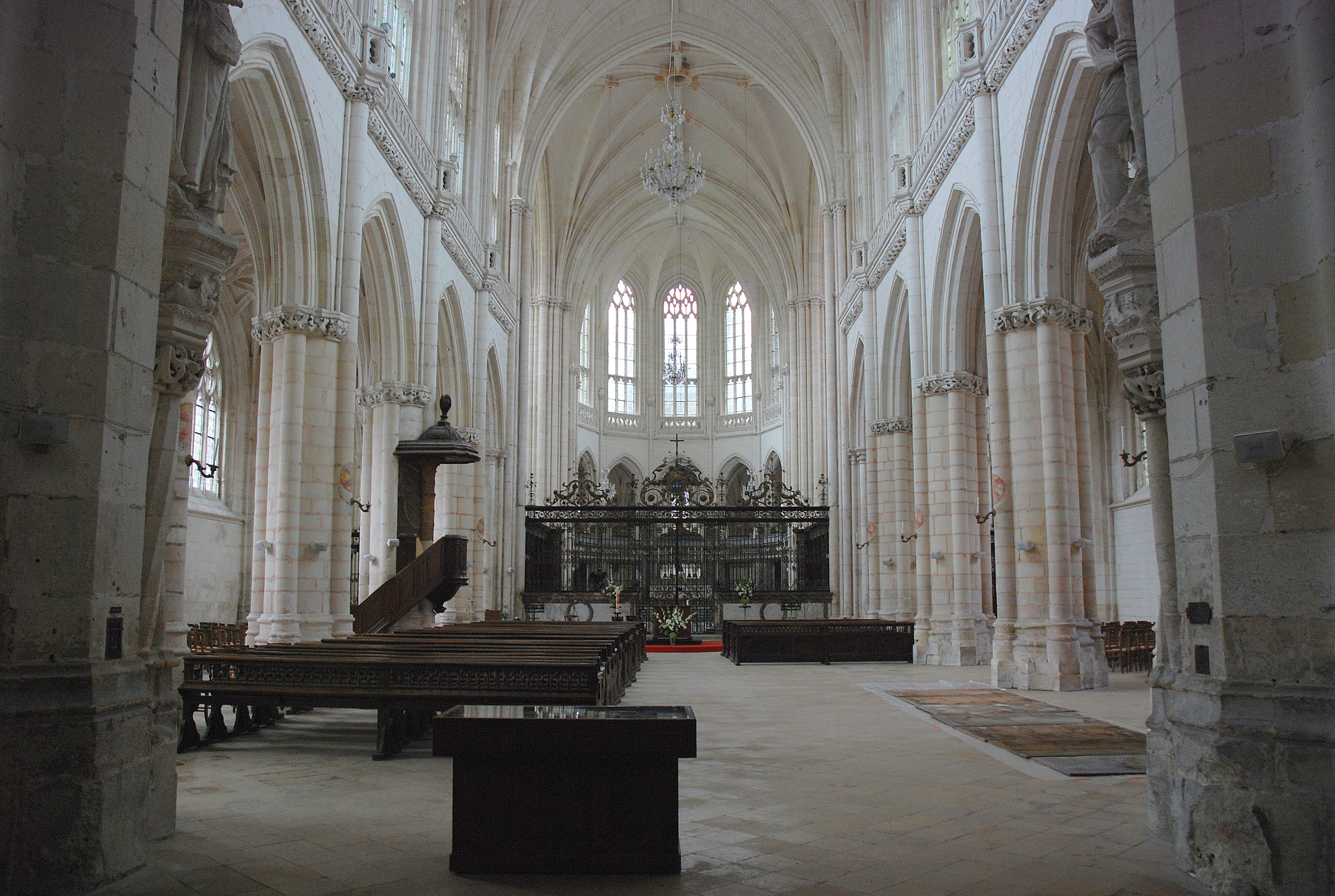 l'abbatiale à Saint-Riquier, France